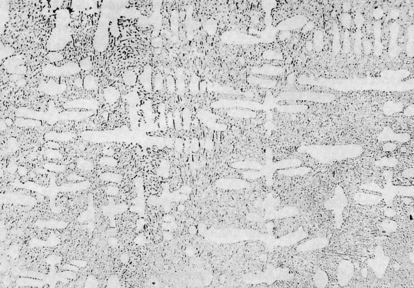 AlSi-Legierung (G-AlSi 12Cu) veredelt